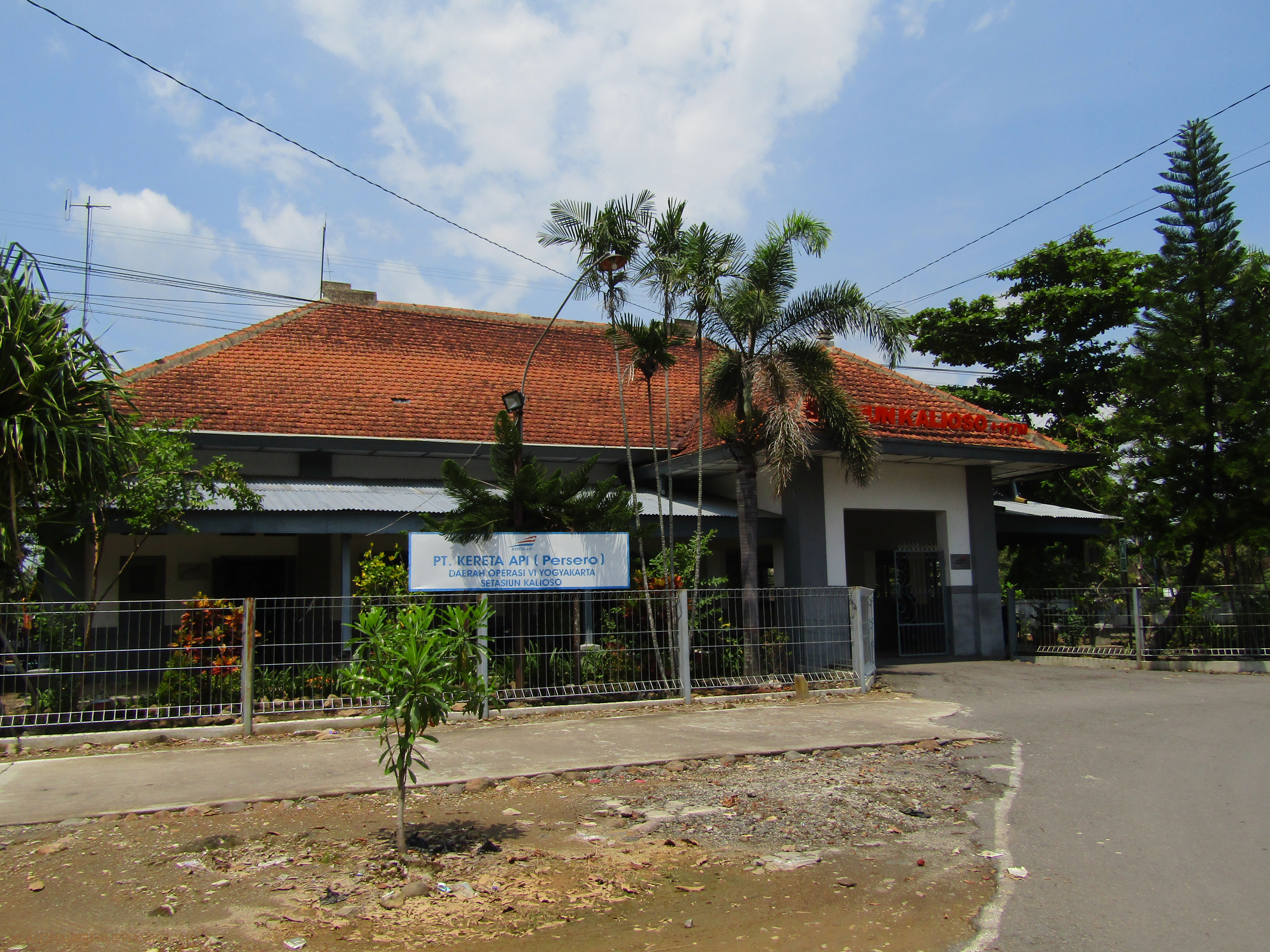 Tampak depan Stasiun Kalioso, 2019